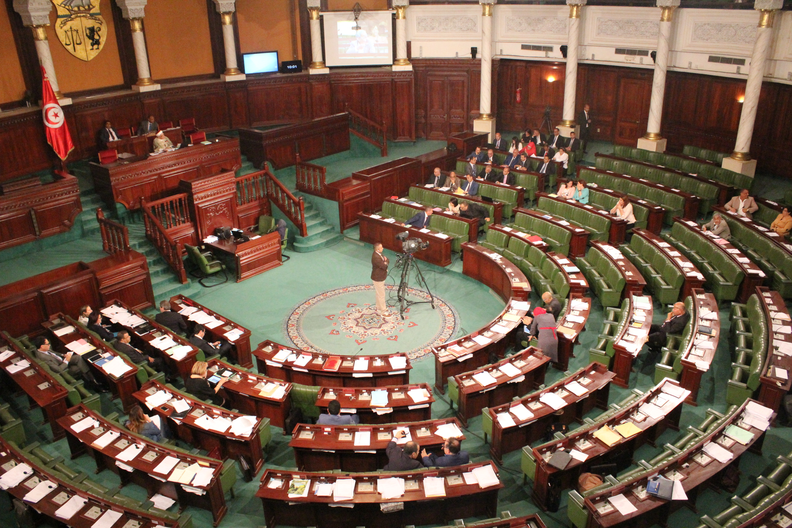 Le Bardo, Tunis, Tunisie باردو ، تونس العاصمة ، تونس